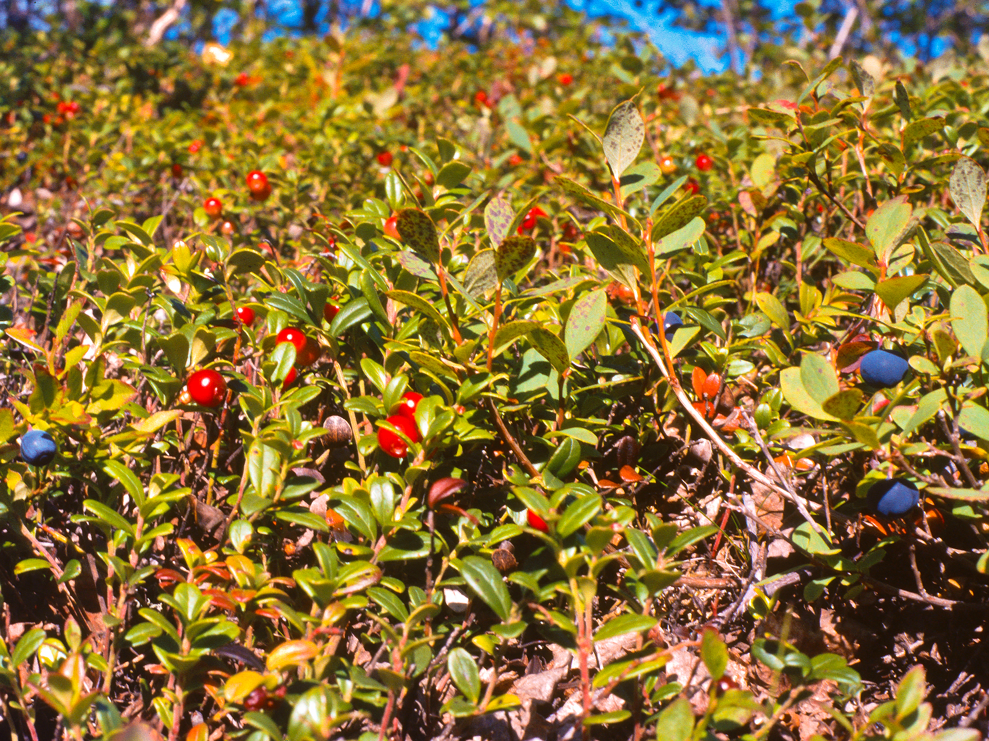 Preiselbeer und Heidelbeer-Zwergsträucher in der Taiga Schwedens